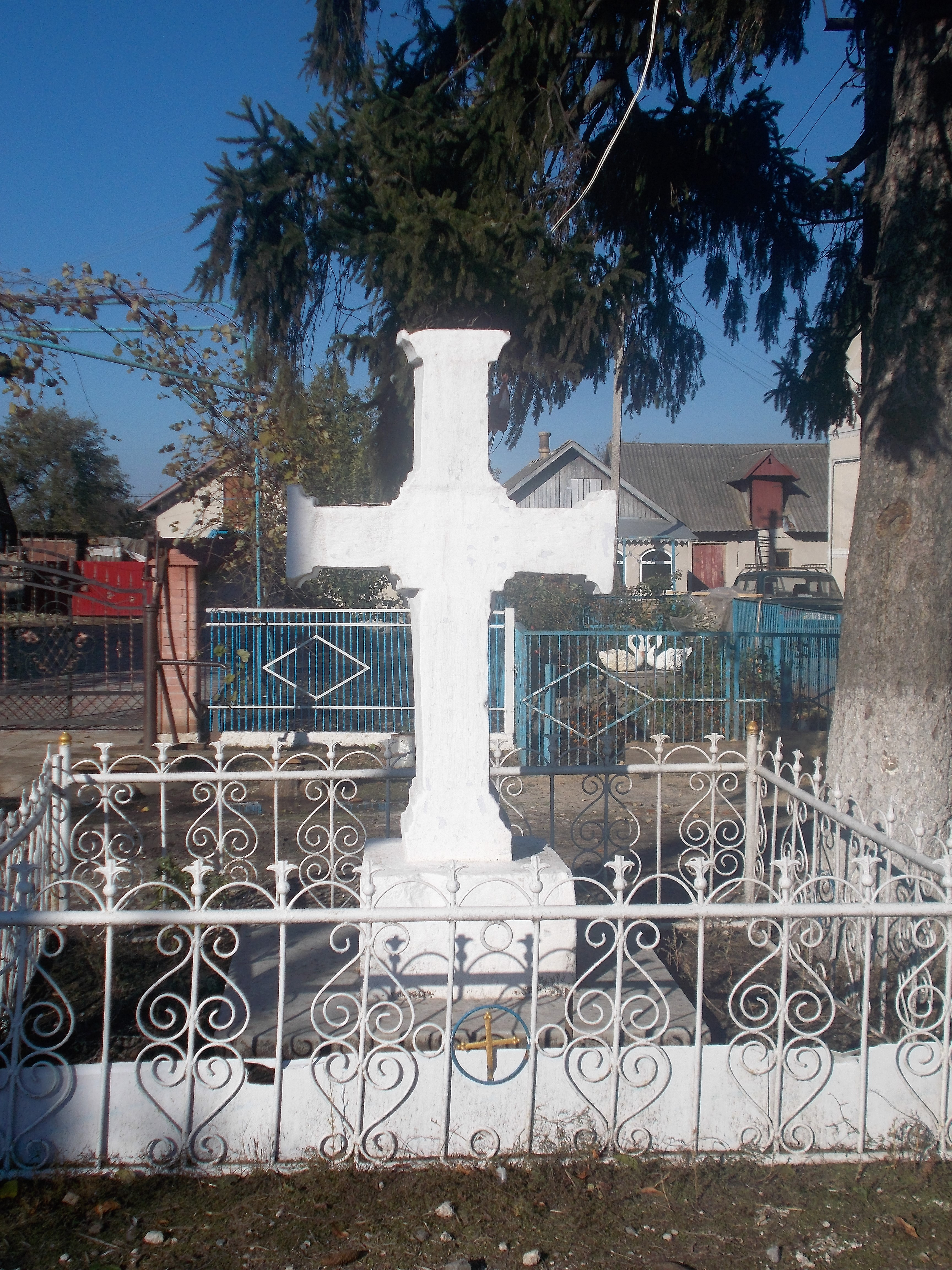 Пам’ятний хрест взнак скасування панщини, встановлений 1849 року, село Вівся